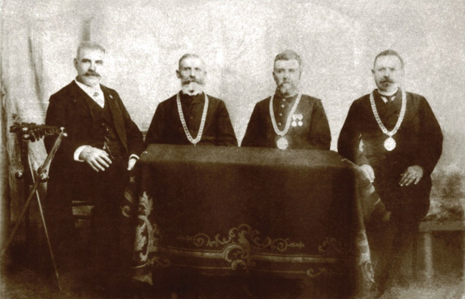 Члени Новомиргородської міської управи (1910 рік). Другий зліва - Демид Кожум'яка.